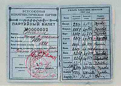 Сталин Иосиф Виссарионович, партийный билет 1927